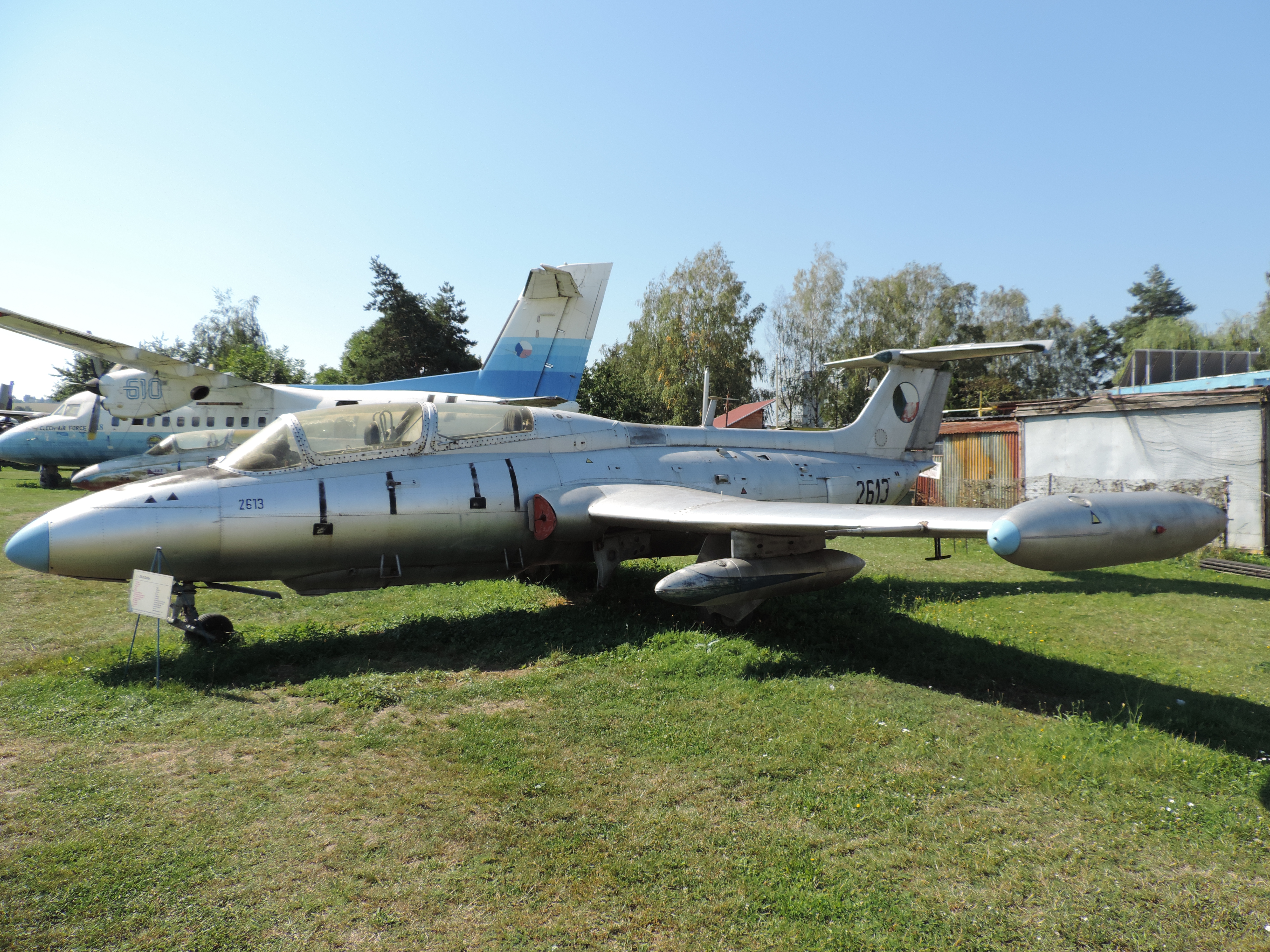 Aero L - 29 R Delfin im Letecké muzeum Kunovice